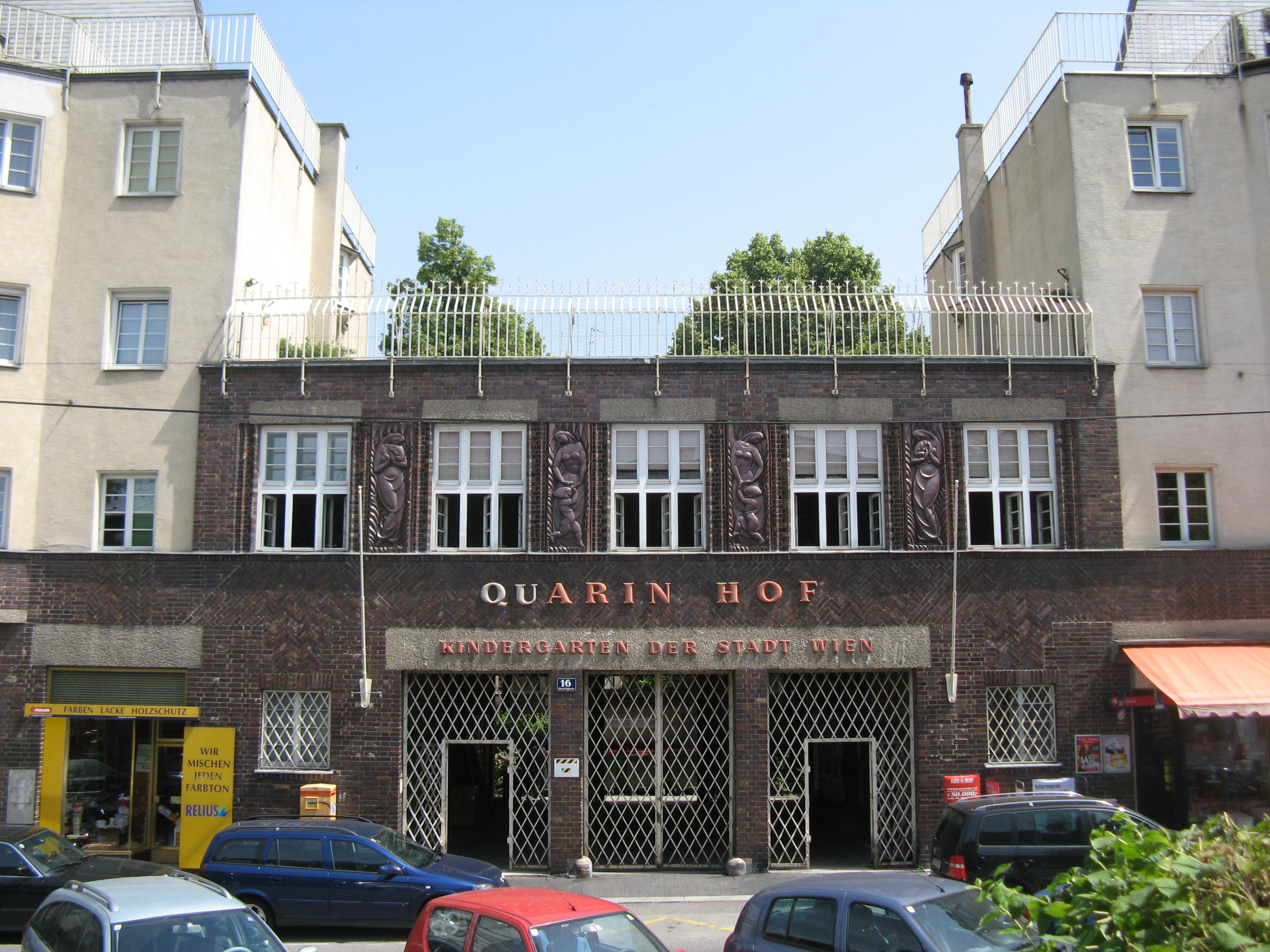 Quarinhof (1924) von Siegfried Theiss und Hans Jaksch, Quaringasse 16, Wien-Favoriten